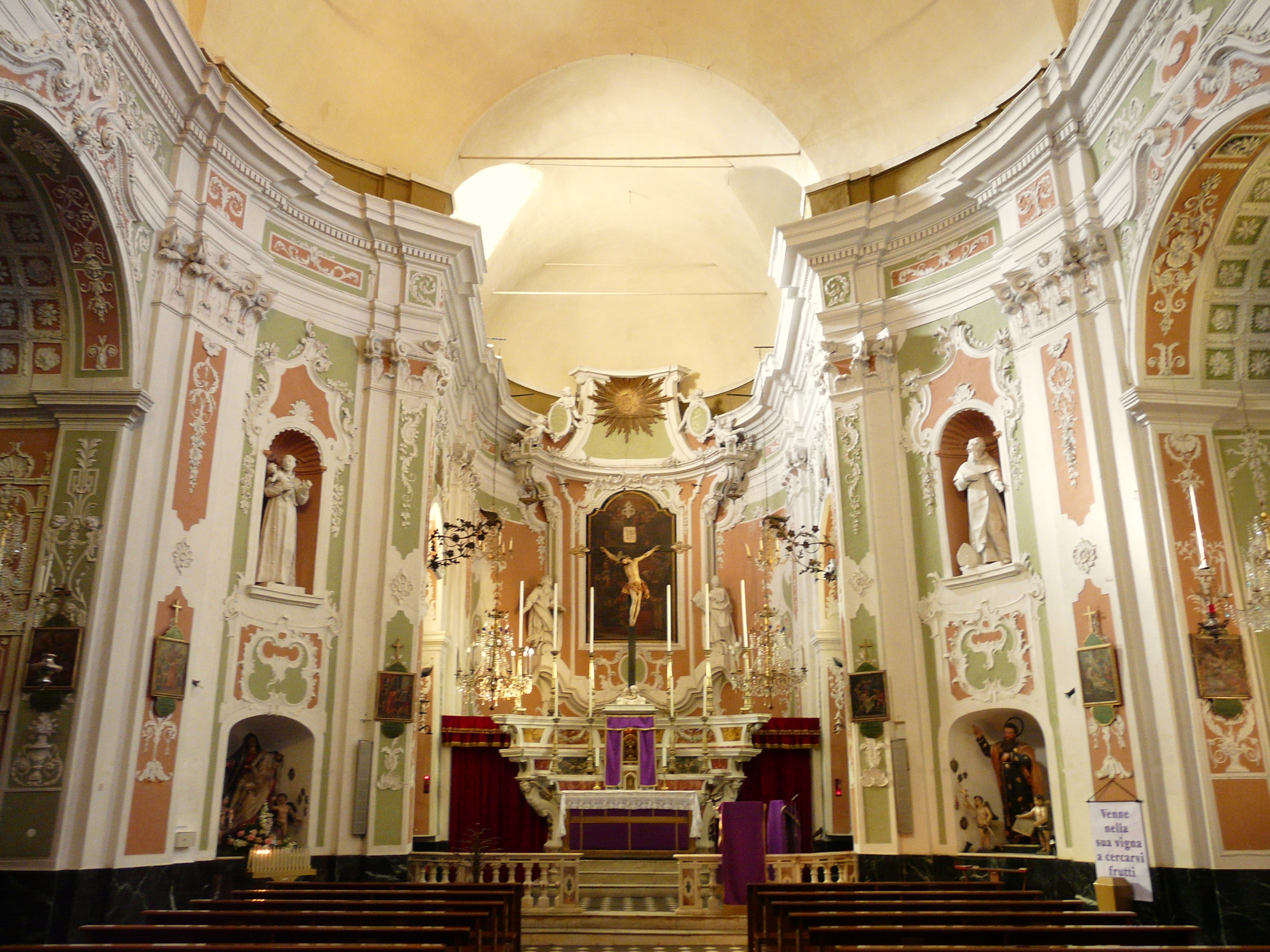 Chiesa della Natività di Maria Vergine, Aurigo, Liguria, Italia